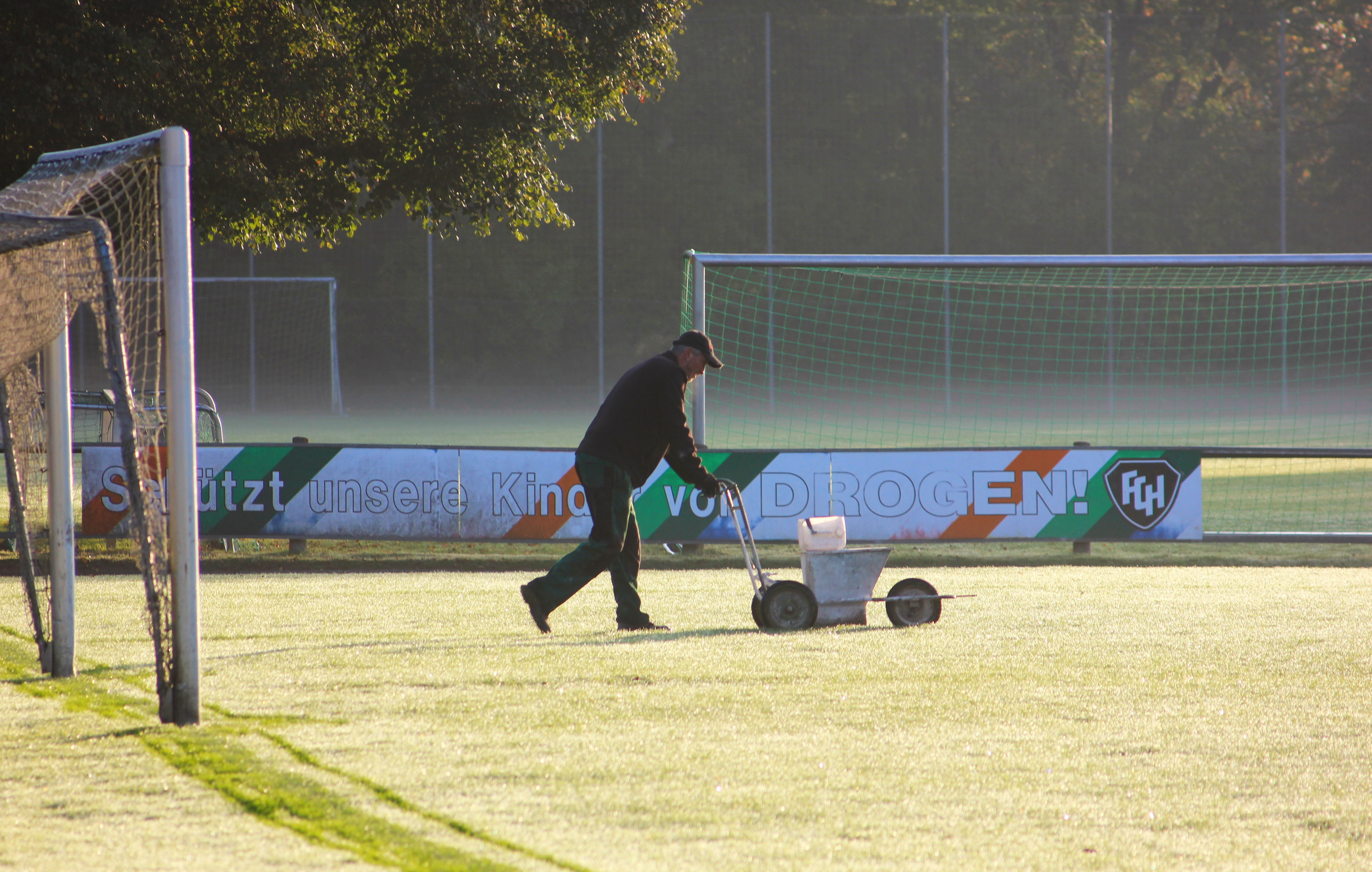 Platzwart zieht die Linien am Fußballfeld.